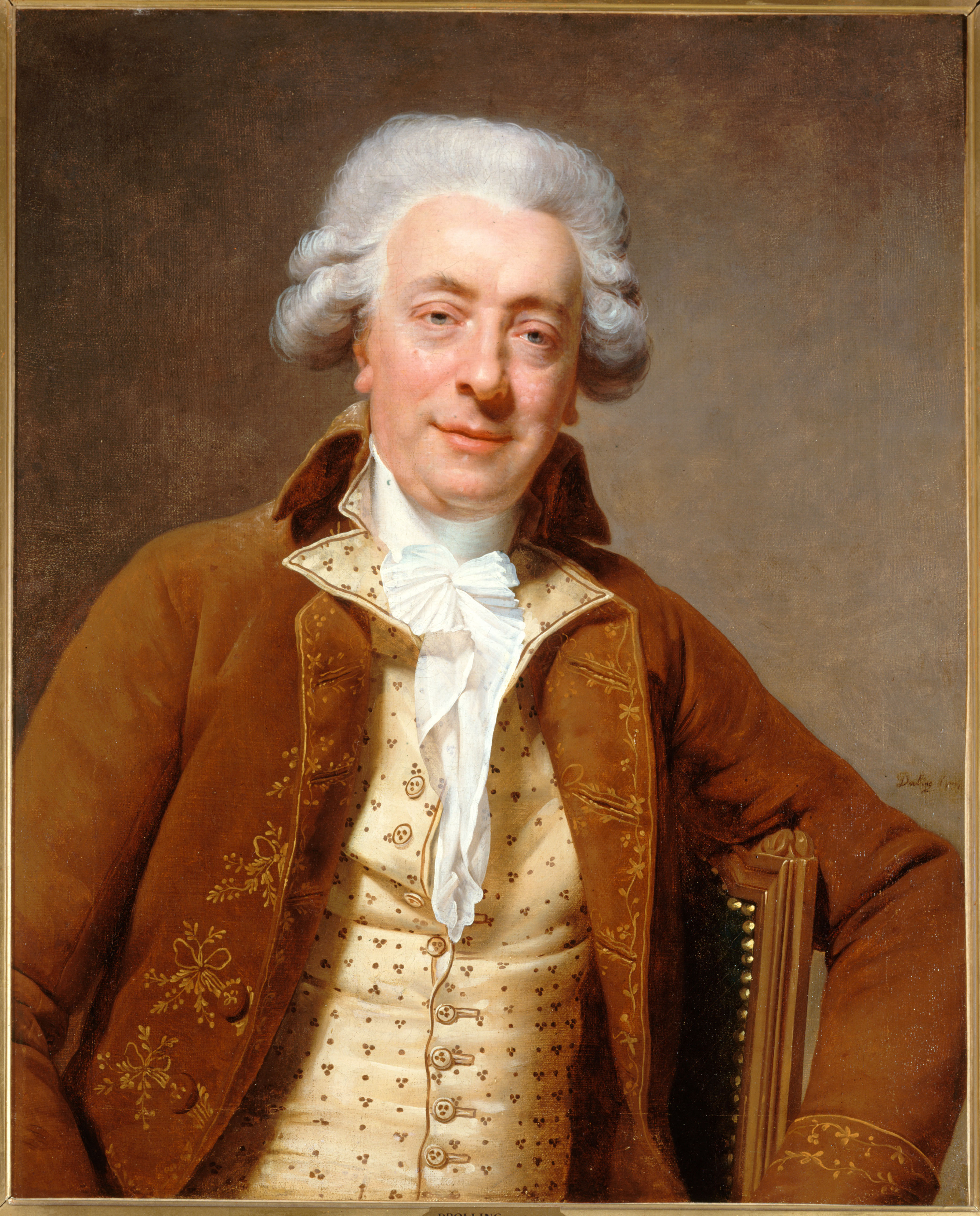 Наиболее знаменитый французский архитектор второй половины XVIII века